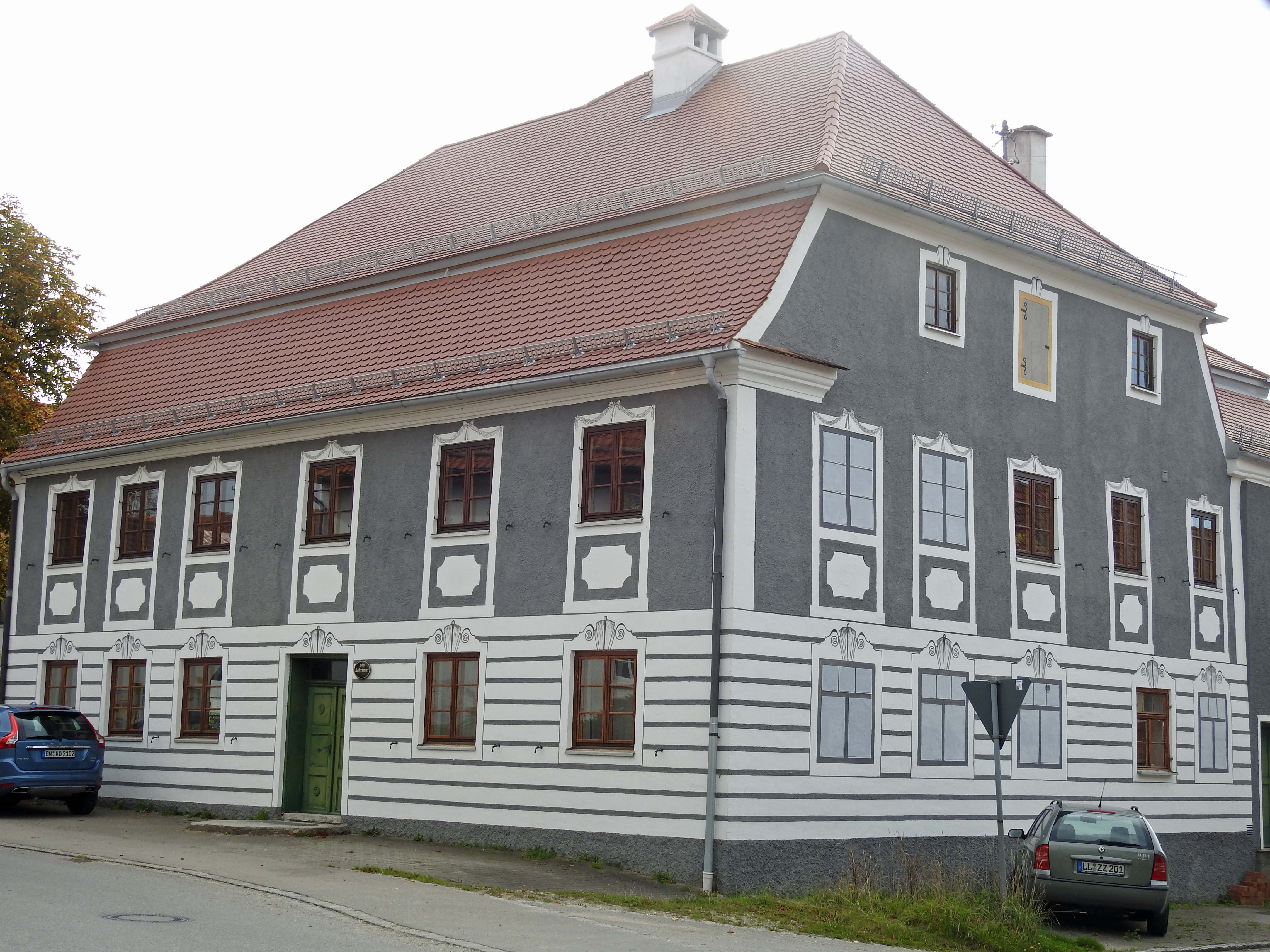 Ehem. Gasthof in Stoffen, Pürgen